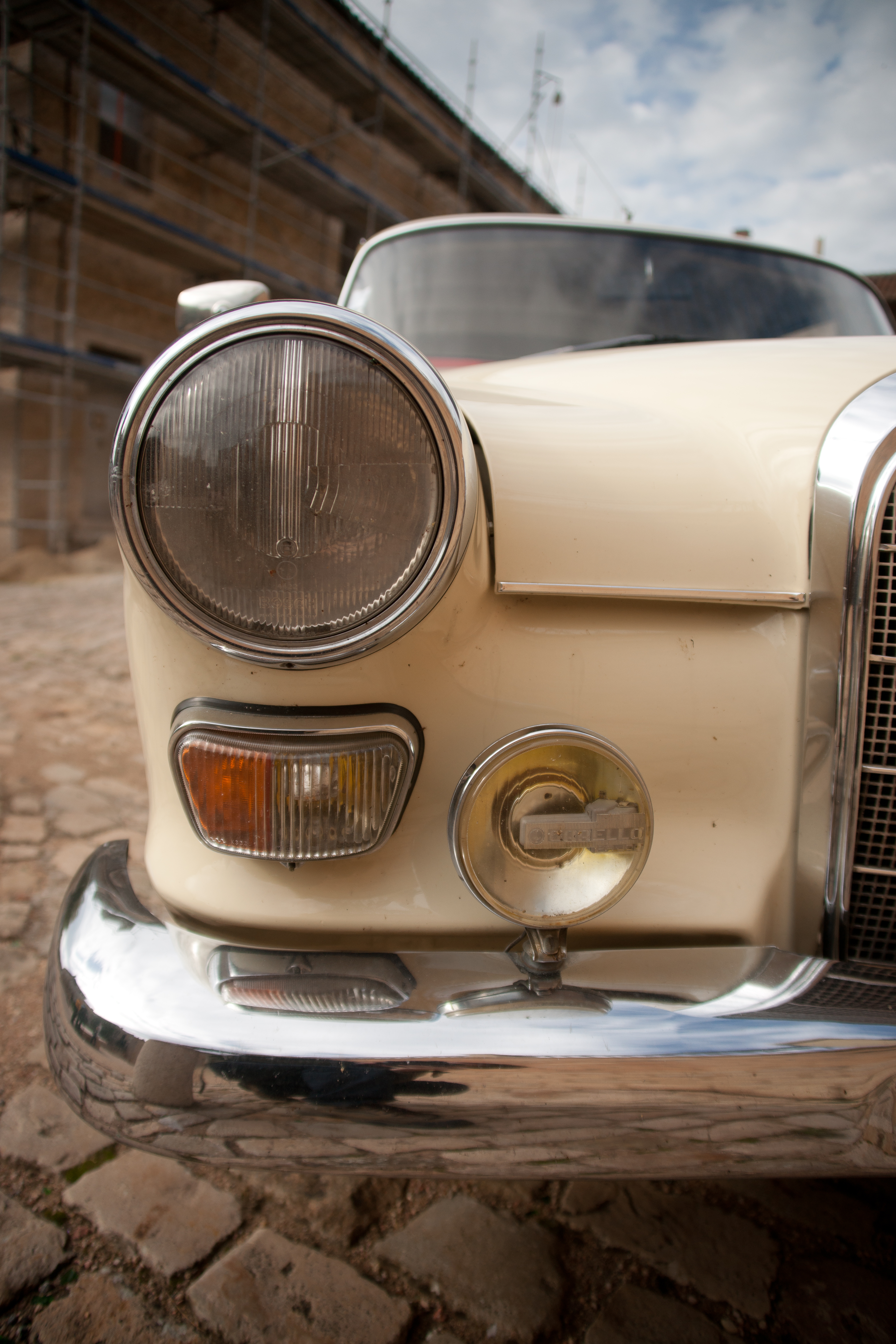 Mercedes-Benz W110 à Cluny.